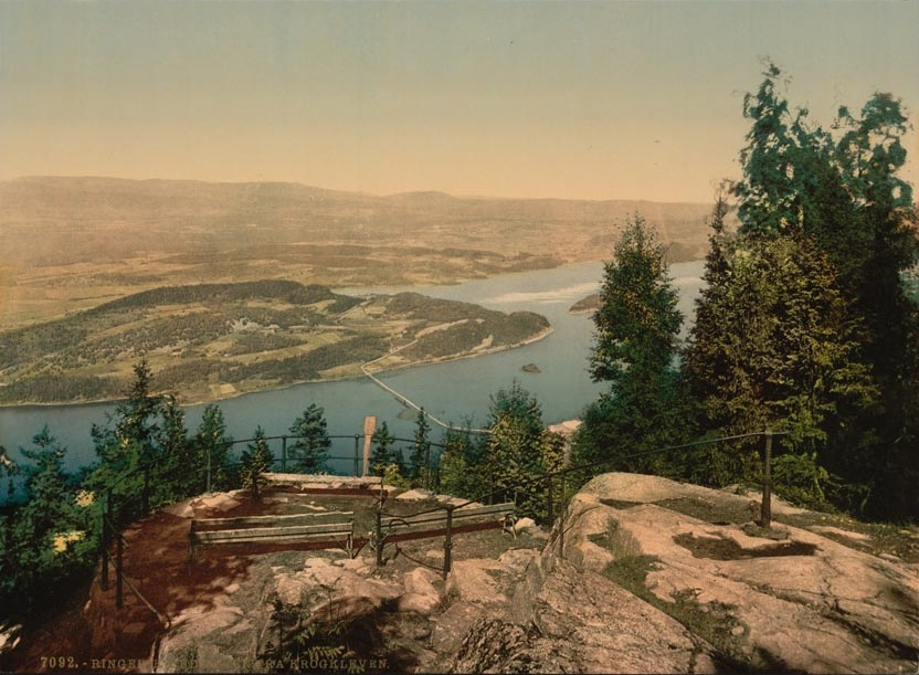 General view from Krogkleven Ringerike Norway